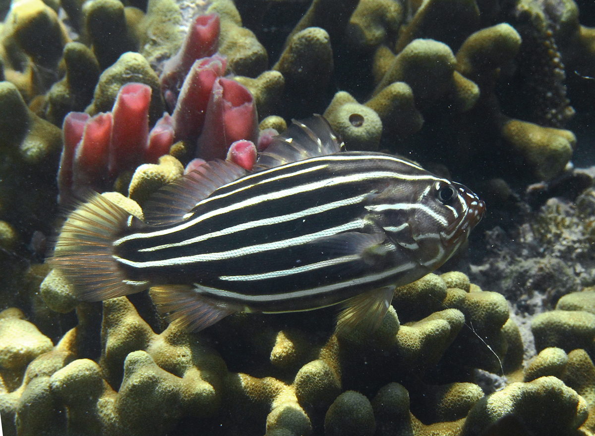 Un poisson-savon à six lignes (Grammistes sexlineatus) à la Réunion.